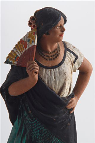 Estatueta Bailarina, de Serafin Marsal.